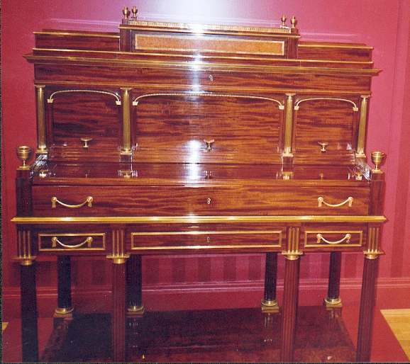 Klassizistischer Schreibschrank von David Roentgen, Pyramidenmahagoni, um 1780/90